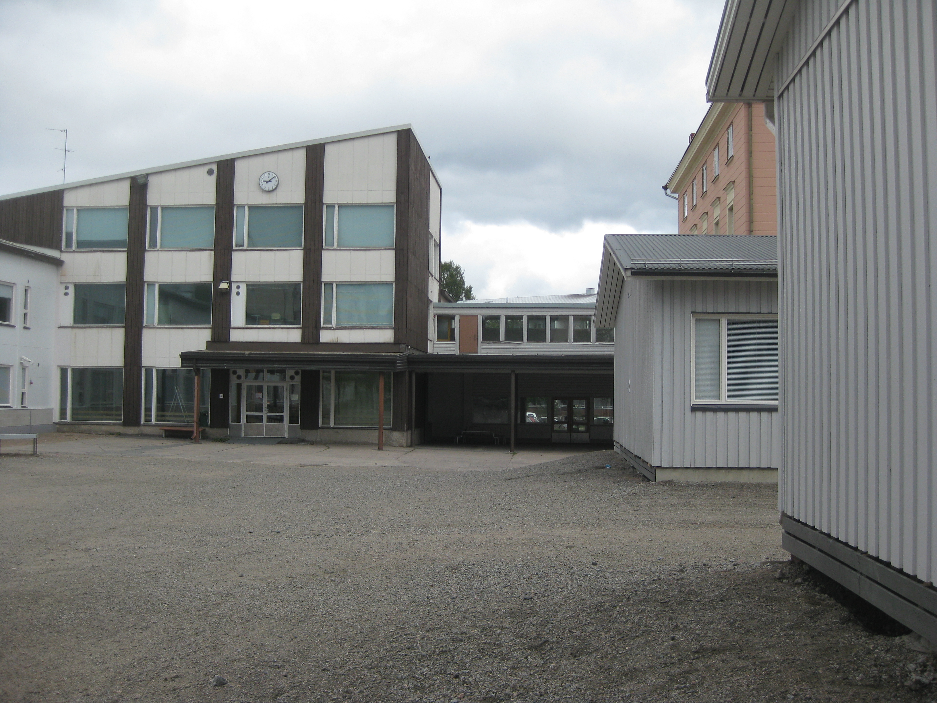 Cygnaeuksen koulukeskus syksyllä 2010. Suoraan edessä näkyy välitalo.